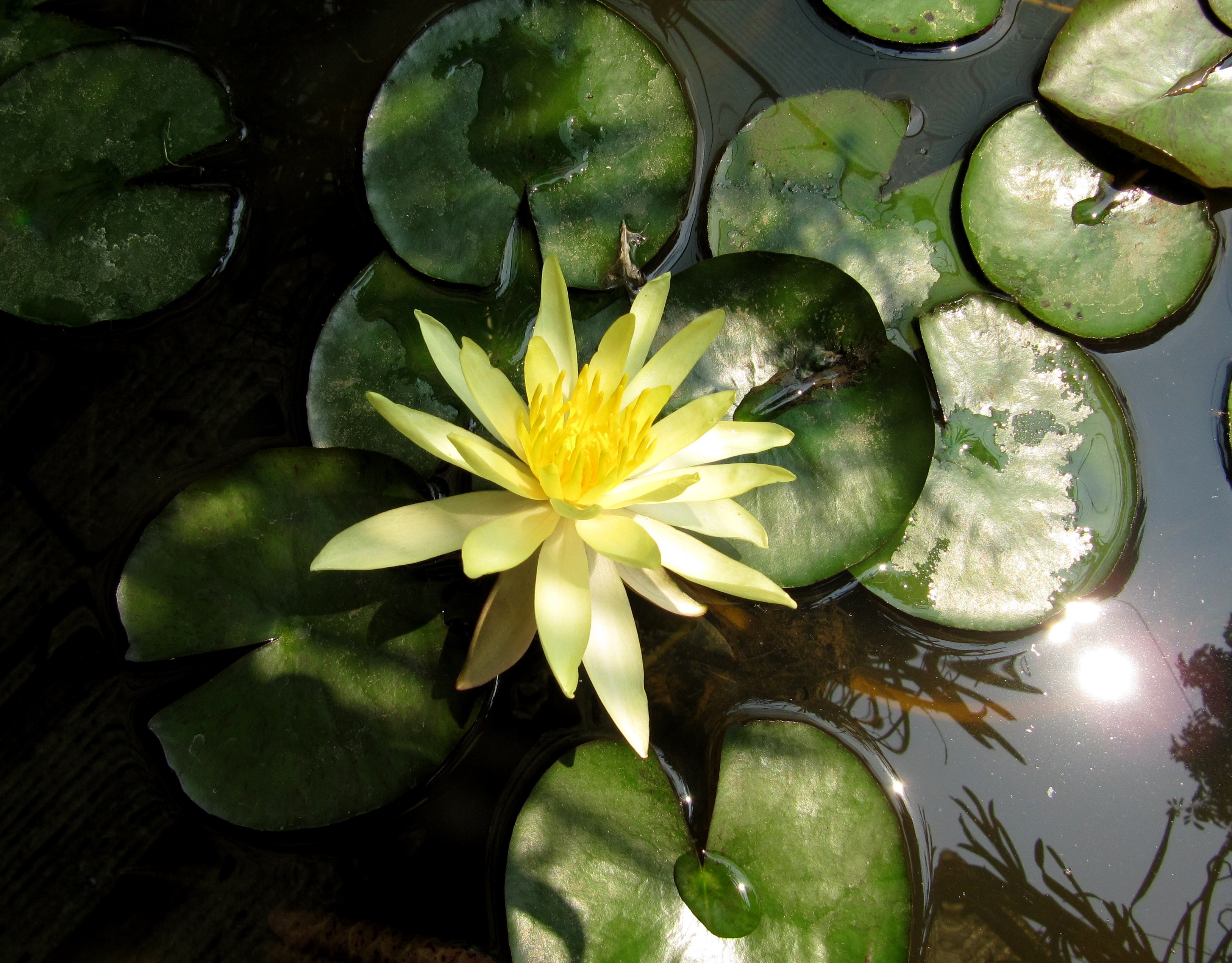 Nénuphar de Thailande